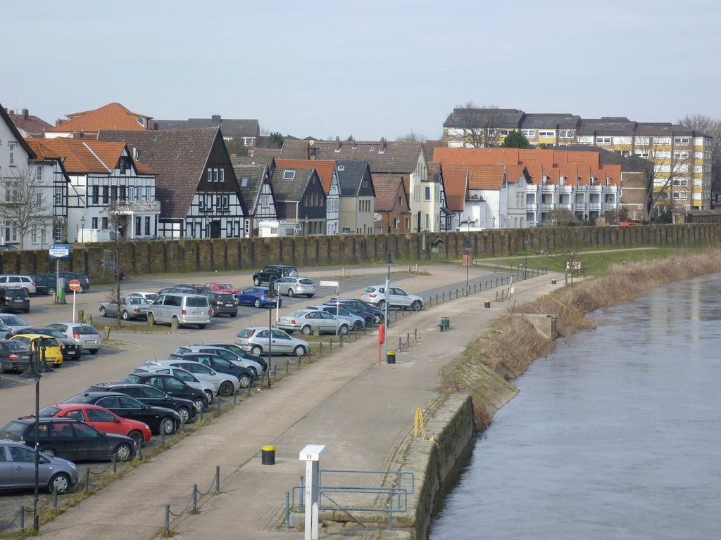 Die Festungsmauer an der Fischerstadt in Minden von der Weserbrücke aus gesehen